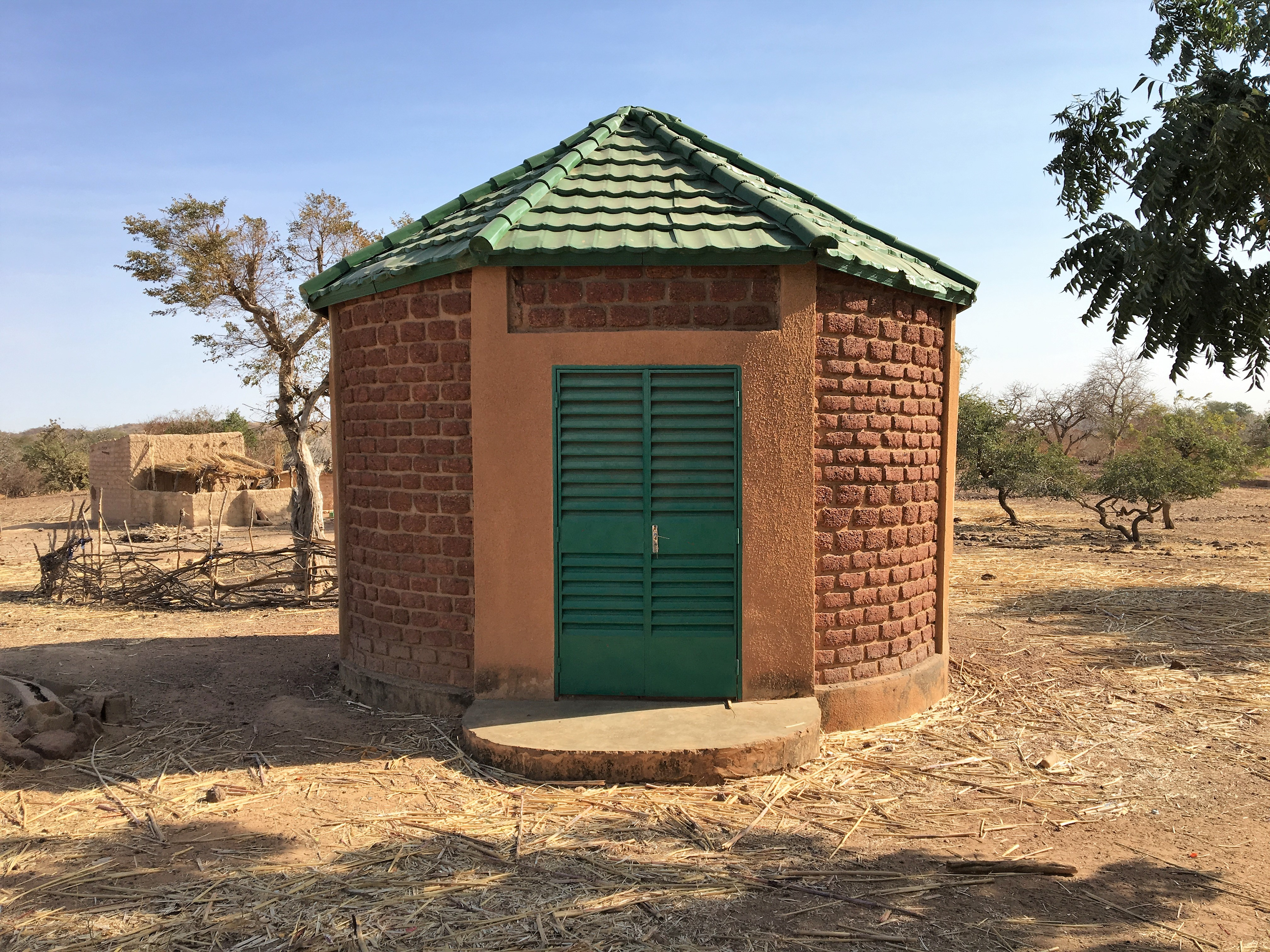 Centre d'alphabétisation de Bogonam Peulh